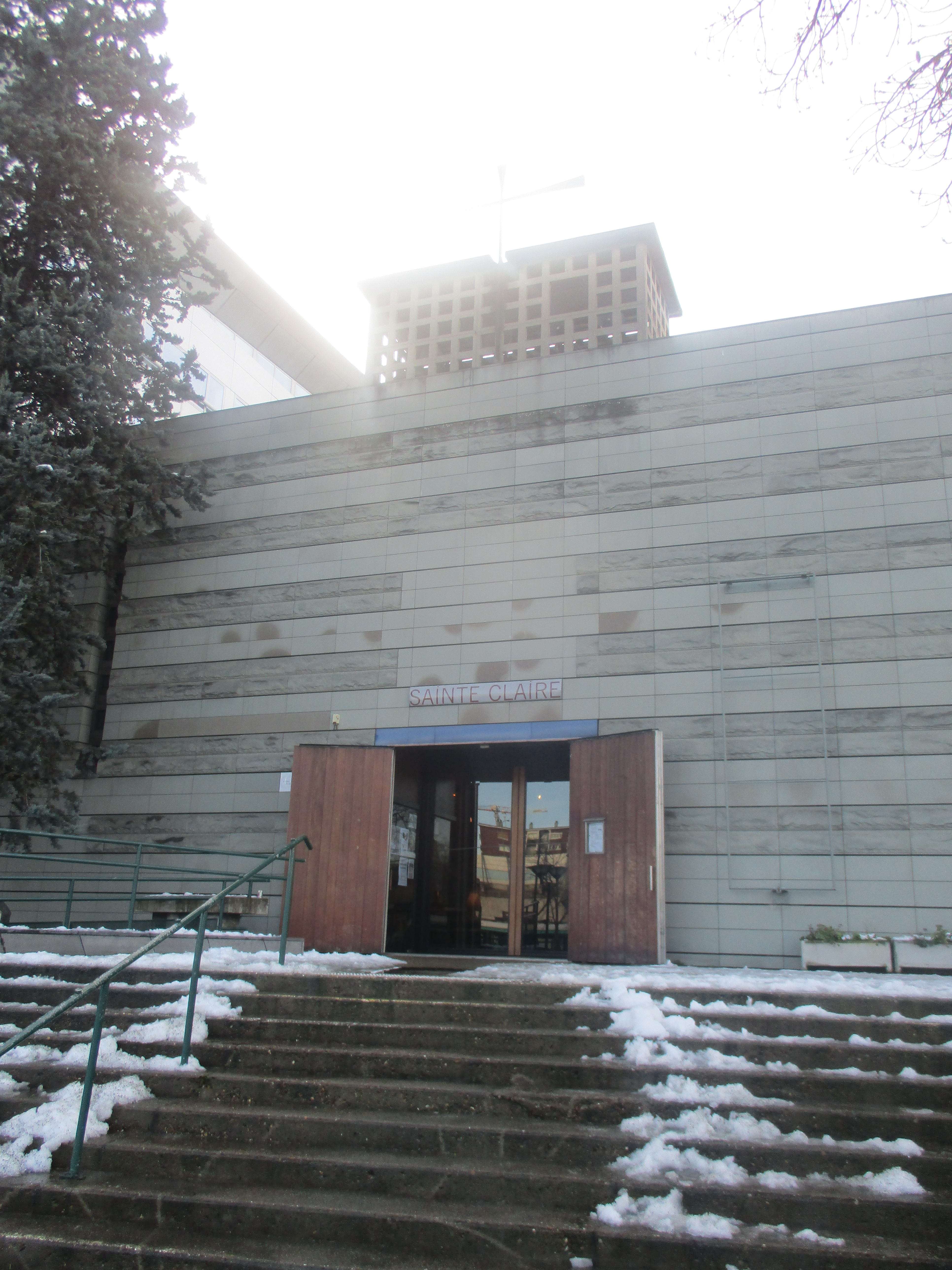 Église Sainte-Claire de la Porte de Pantin.